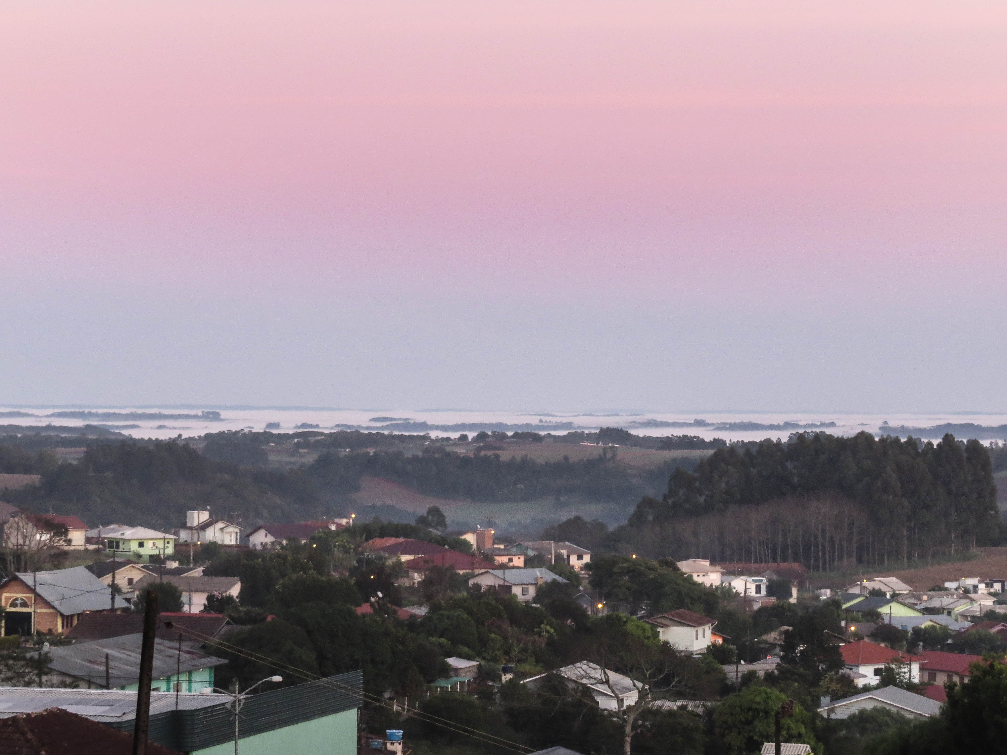 Vista parcial da área urbana de Iporã do Oeste